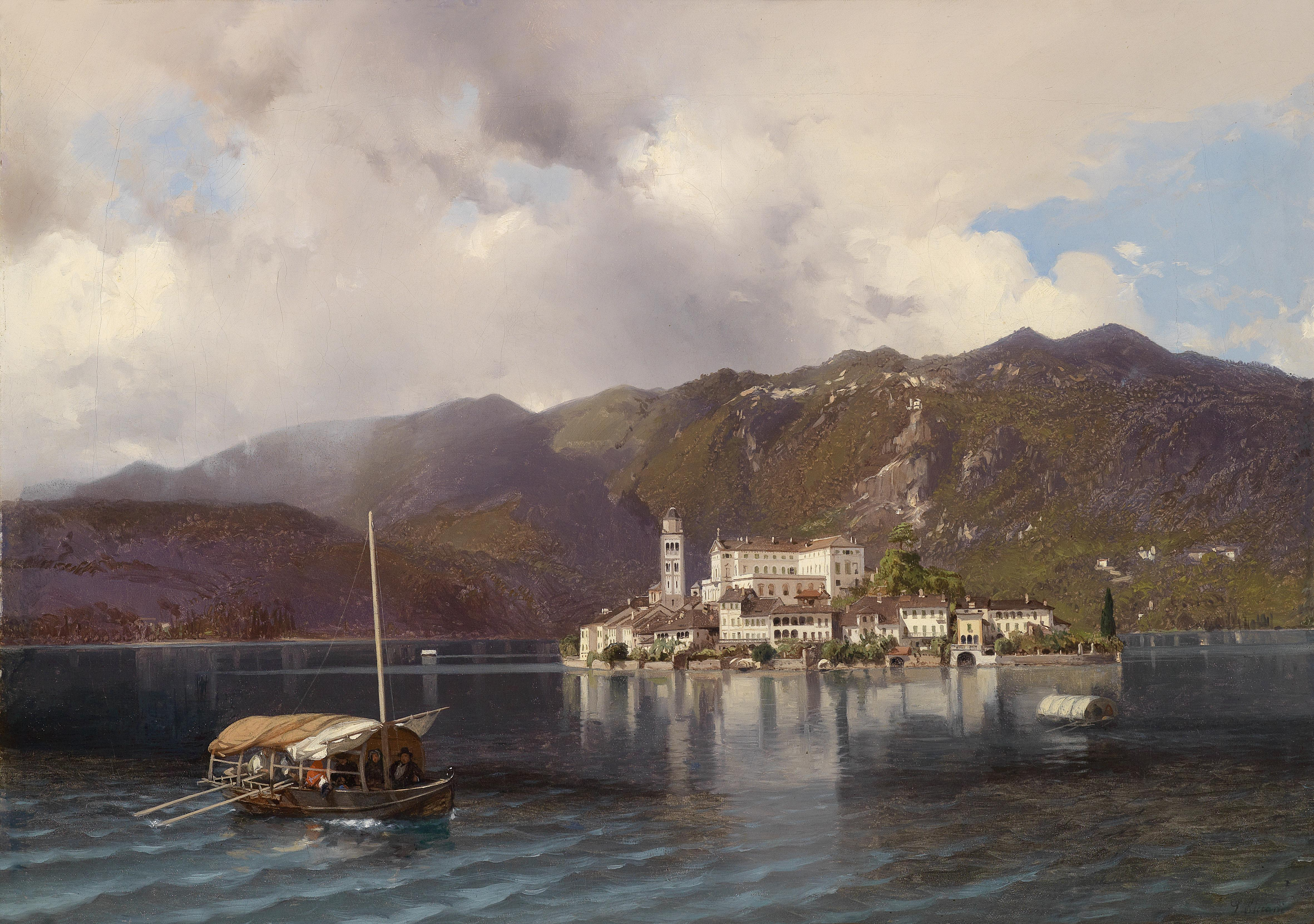 Blick auf Isola San Giulio im Ortasee/Piemont, signiert L. Riccardi, Öl auf Leinwand, 45 x 63,5 cm